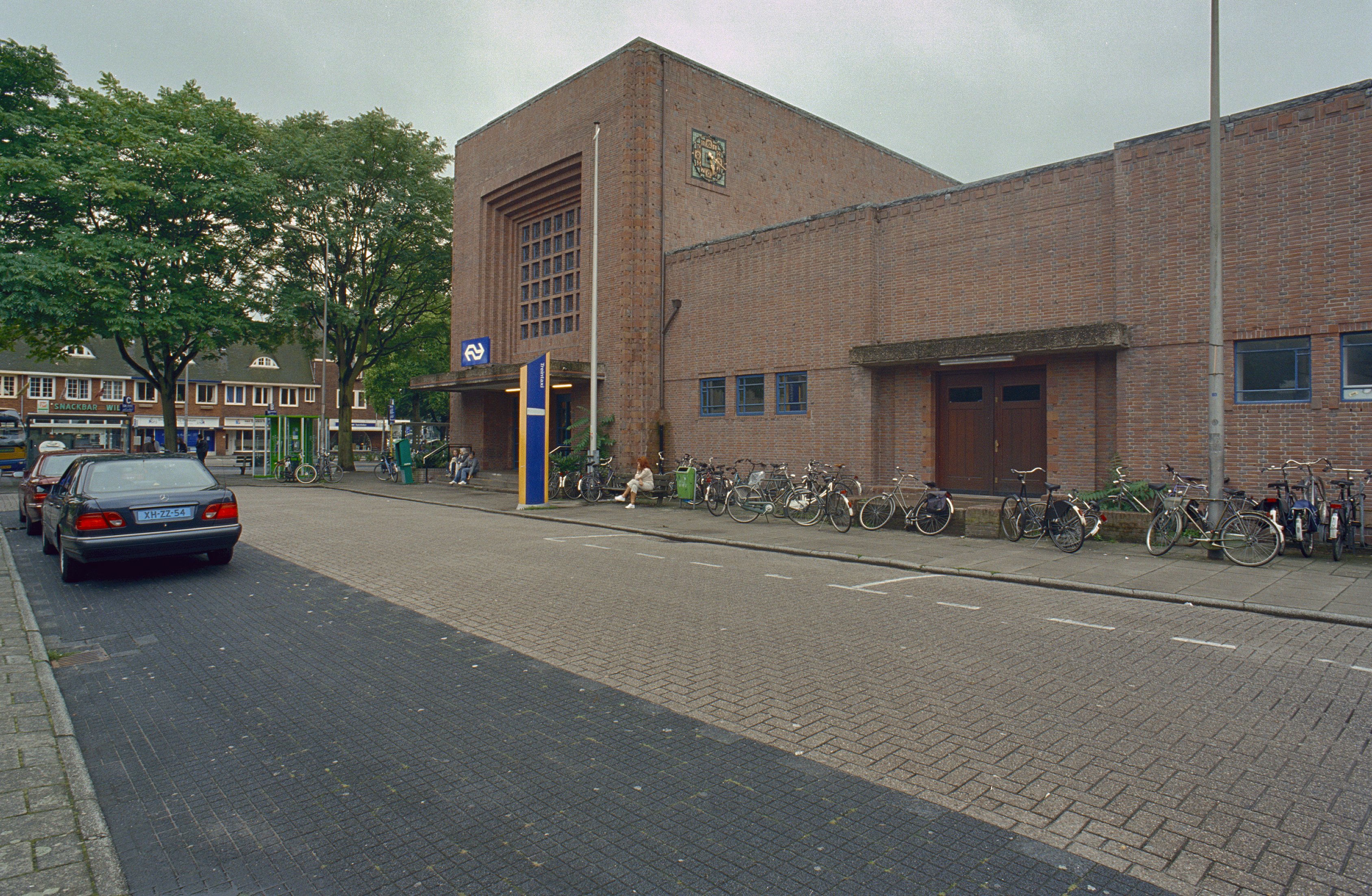 Station Bussum/Naarden: Overzicht gedeelte voorgevel, stationsgebouw (opmerking: Gefotografeerd voor het Monumenten boek, Karel Loeff)